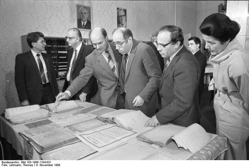 Coswig, Archivgut jüdischer Gemeinden / Organisationen ADN-ZB Lehmann 4.11.1988 Bez. Halle: Wertvolles Archivgut jüdischer Gemeinden und Organisationen begutachteten in der Außenstelle Coswig des Zentralen Staatsarchivs der Präsident des Verbandes der Jüdischen Gemeinden in der DDR, Siegmund Rotstein (2.v.r.), und der Direktor der Stiftung "Neue Synagoge Berlin - Centrum Judaicum", Dr. Hermann Simon (3.v.r.): Erläuterungen gibt hier Archivrat Dr. Hermann Schreyer (4.v.r.): 2.v.l. der Staatssekretär für Kirchenfragen, Kurt Löffler. [Cowig.- vlnr: unbekannt, Kurt Löffler, Hermann Schreyer, Hermann Simon, Siegmund Rottsein, Elisabeth Brachmann-Teubner] Abgebildete Personen: Rotstein, Siegmund: Präsident des Verbandes der Jüdischen Gemeinden, DDR Löffler, Kurt: Minister für Kultur, Staatssekretär für Kirchenfragen, DDR Simon, Hermann Dr.: Direktor Stiftung Neue Synagoge Berlin Centrum Judaicum, DDR